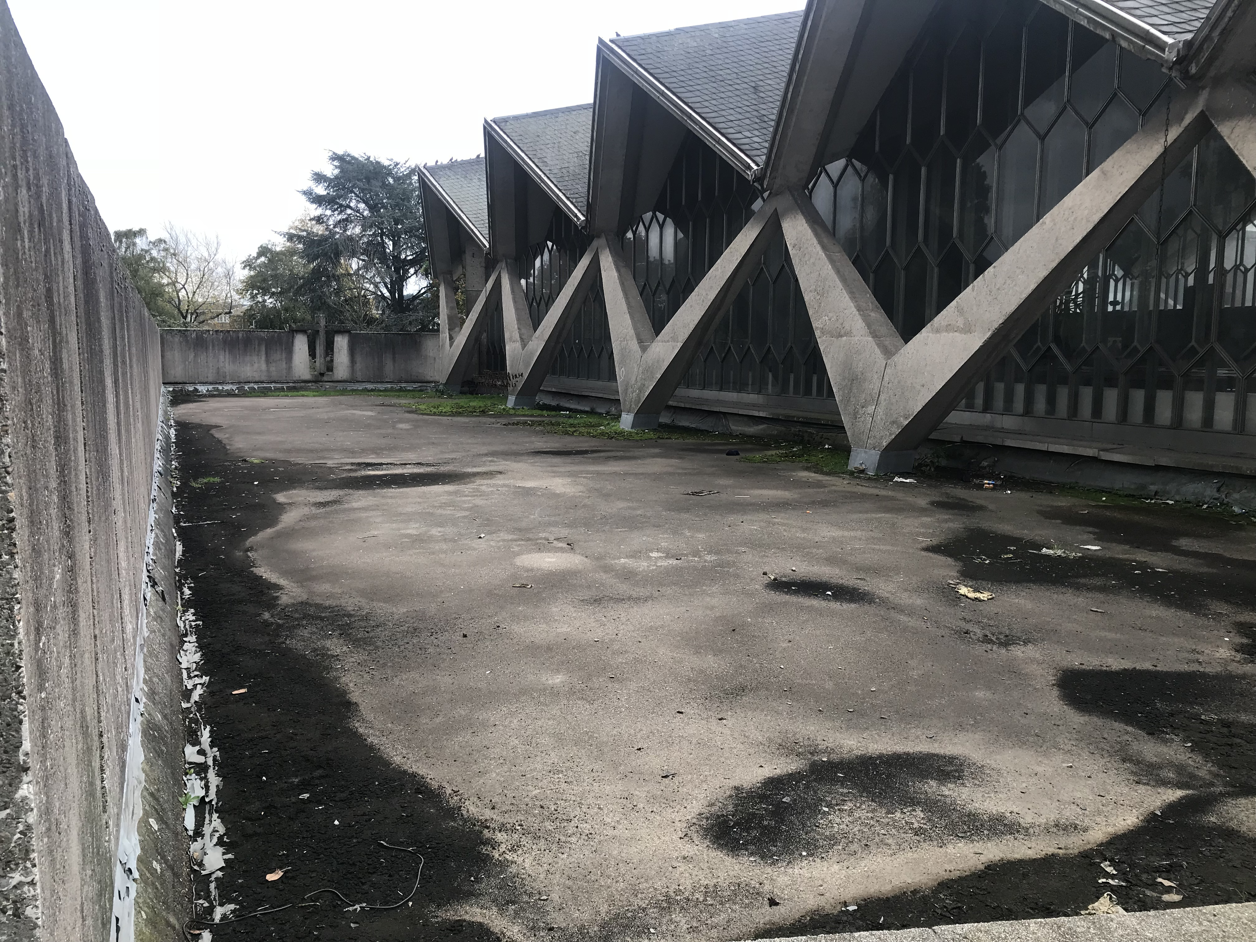 Eglise paroissiale Saints-Pierre-et-Paul à Droixhe, Liège